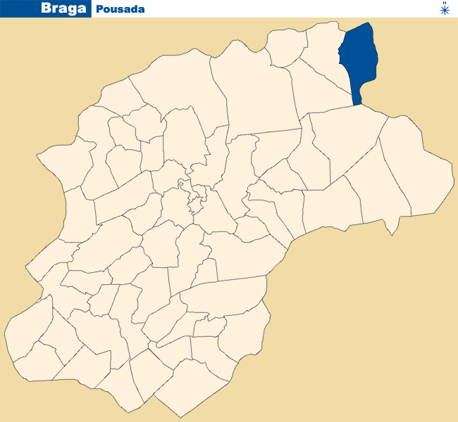 Localização de Pousada no concelho de Braga.